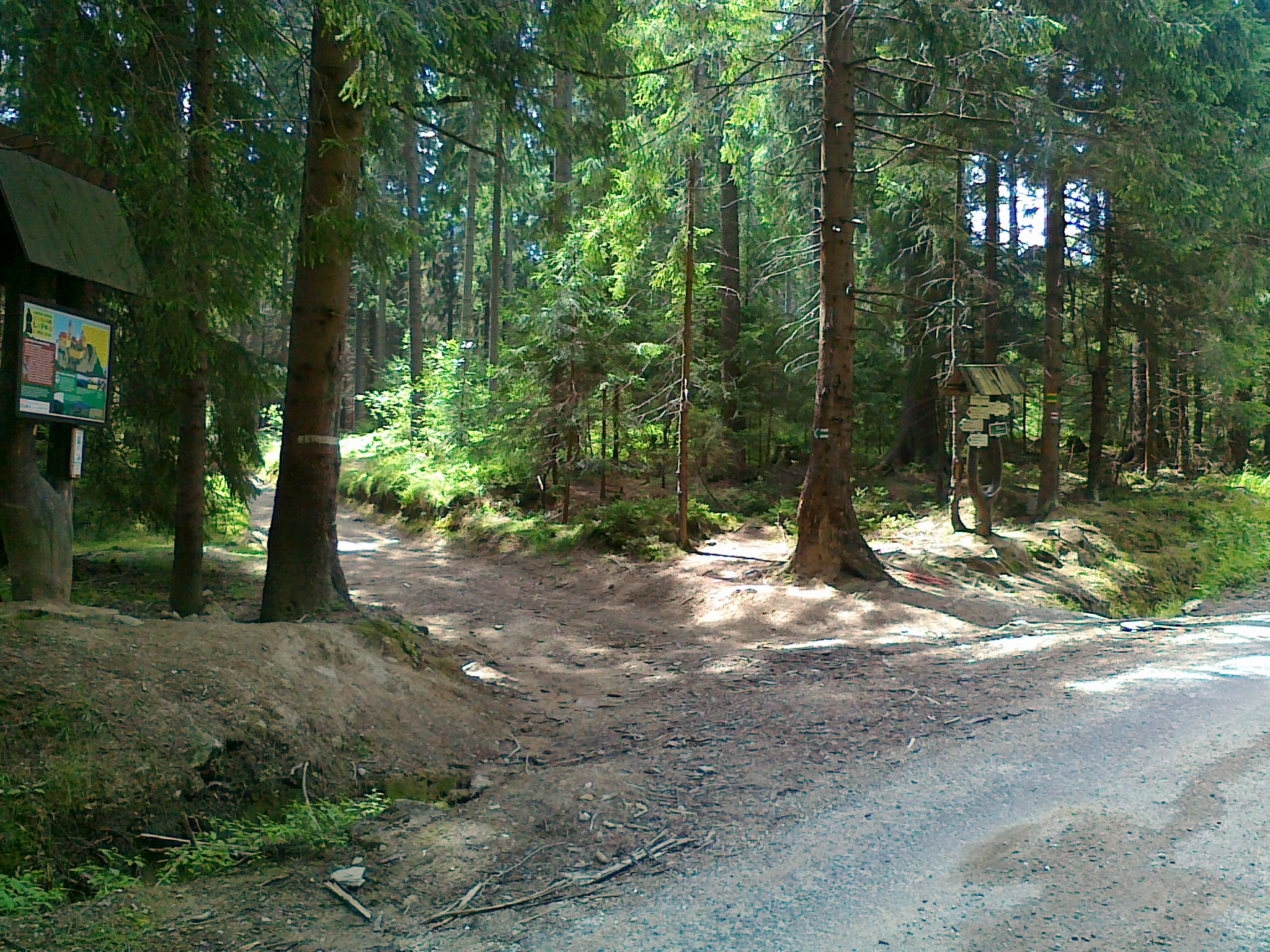 Skrzyżowanie szlaków w miejscu o nazwie Pod Koberštejnem (710 m n.p.m.).